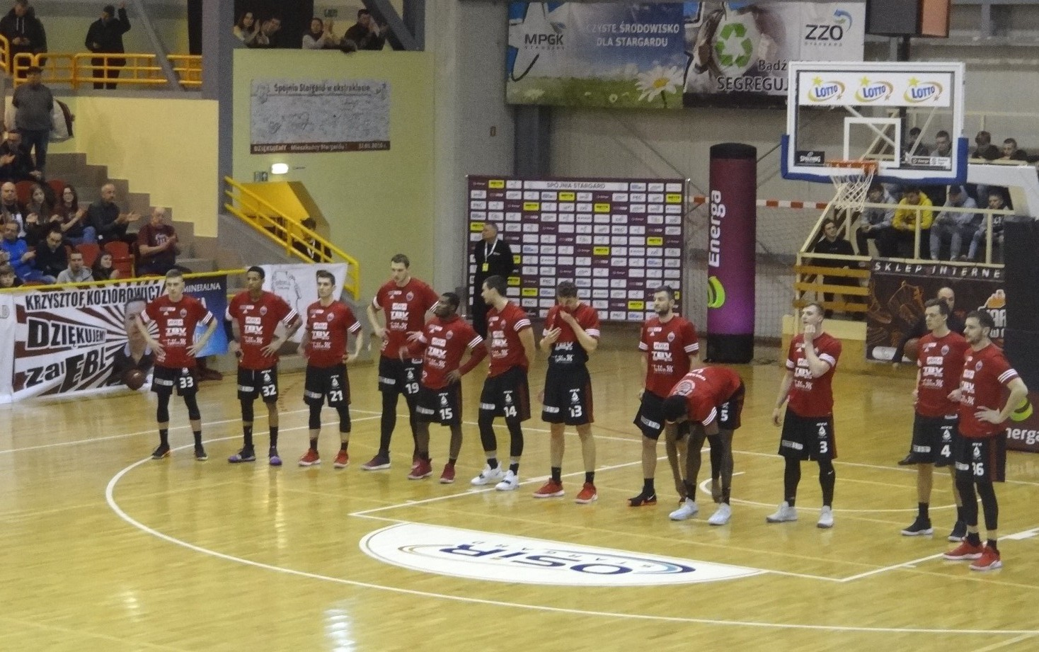 TBV Start Lublin (03.01.2019)